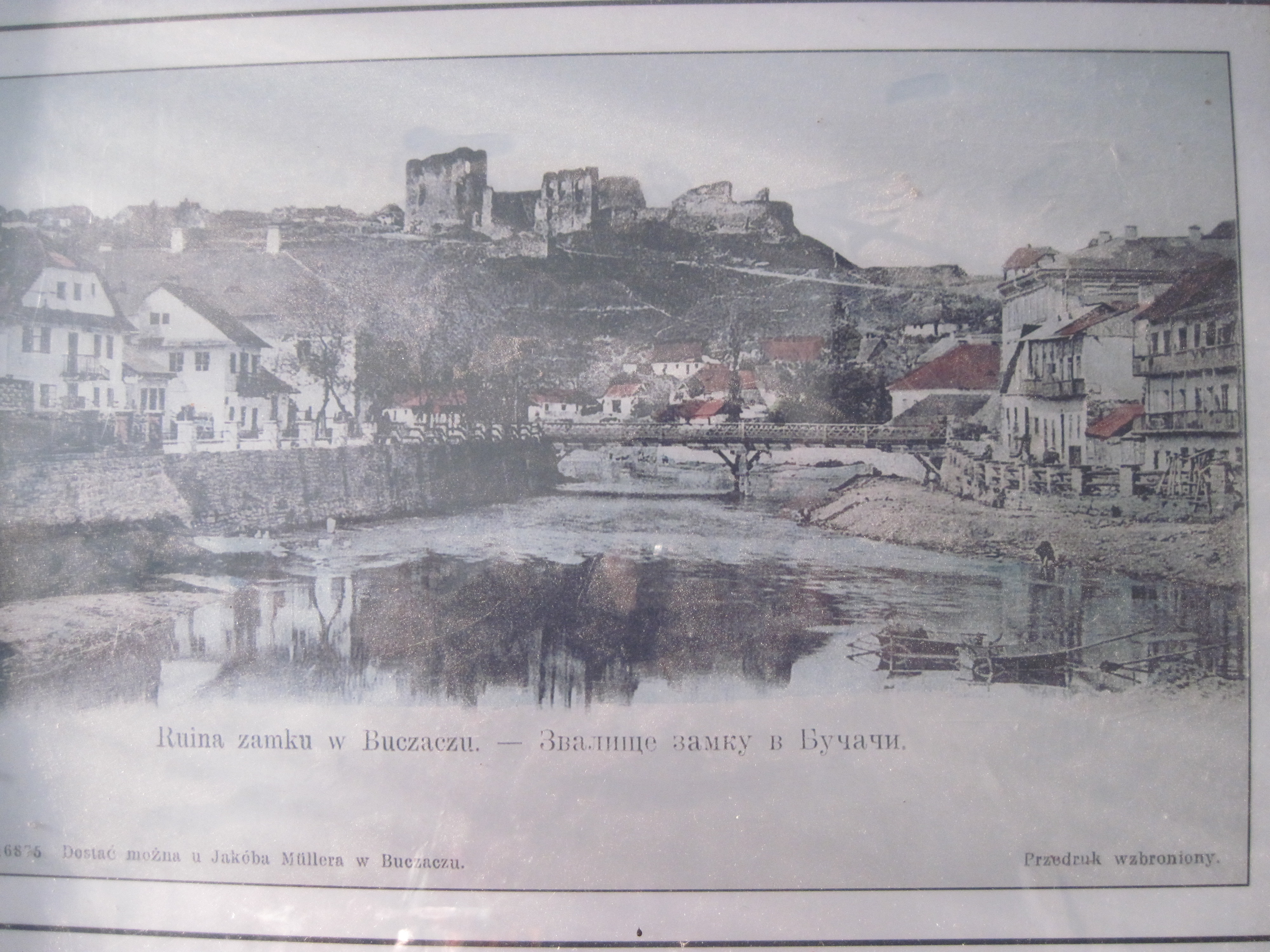 Бучач